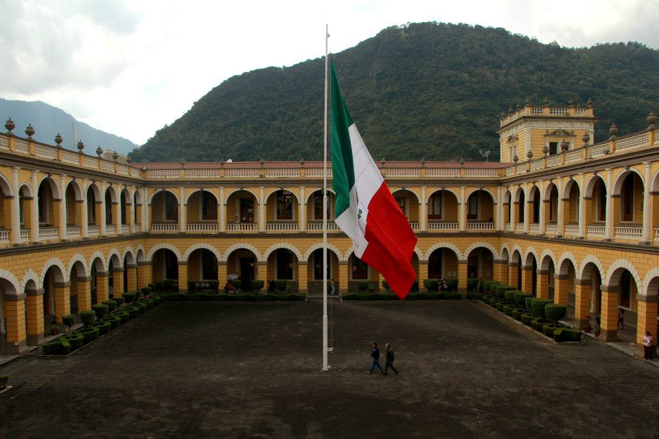 Palacio Municipal de Orizaba, Veracruz.